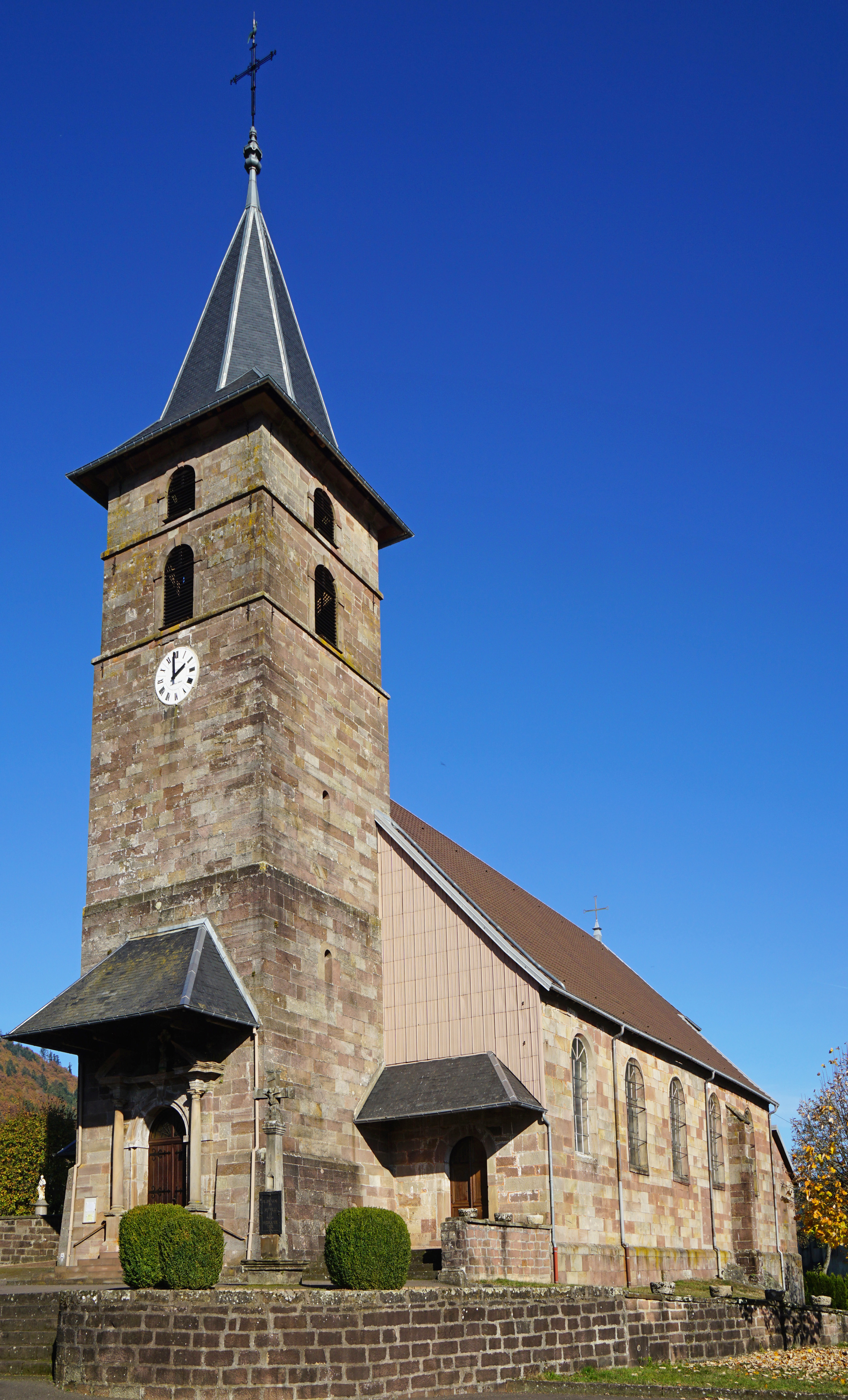 L'église Notre-Dame-de-l'Assomption de Servance.